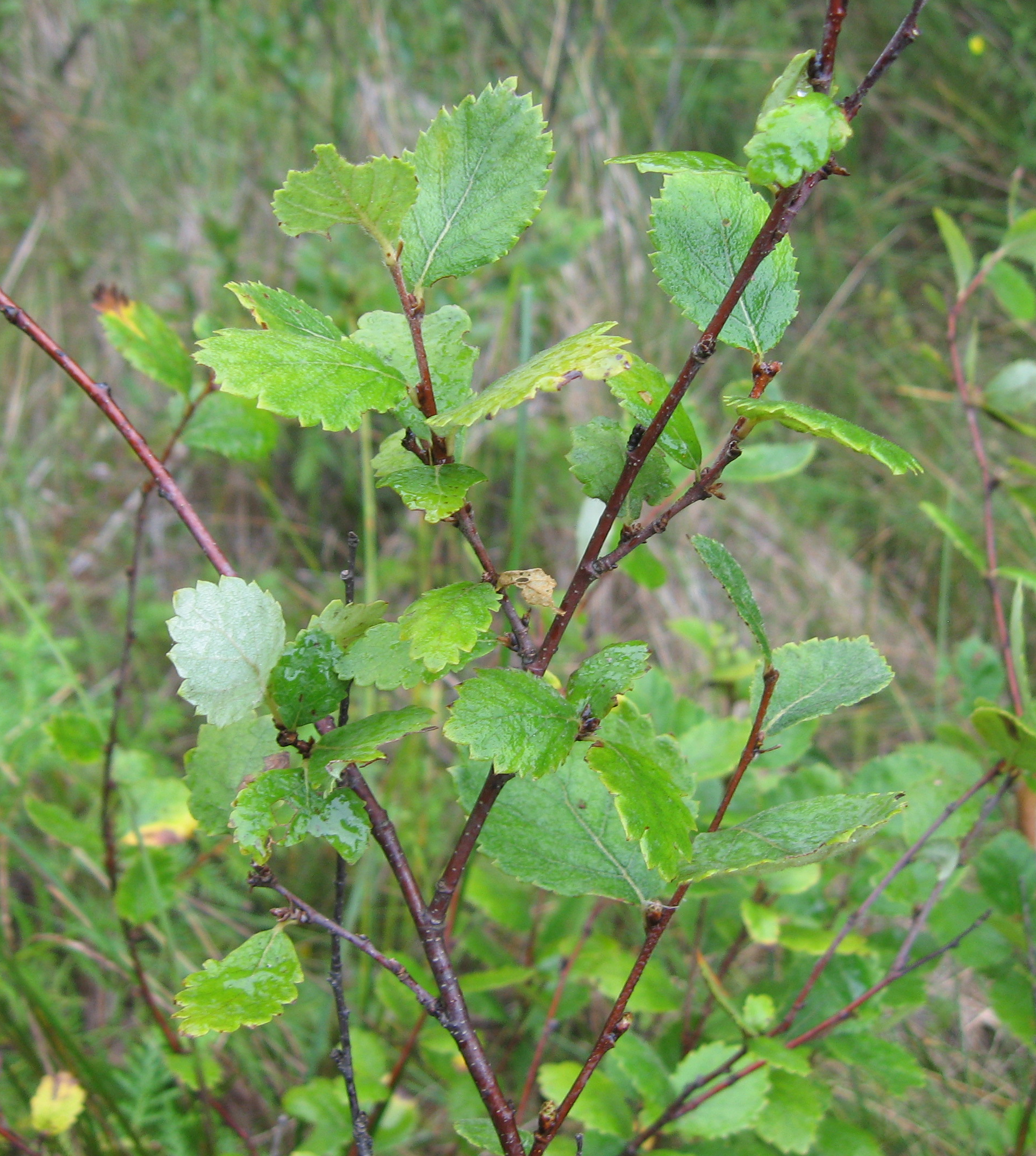 Betula pumila, Cedar Bog, Ohio